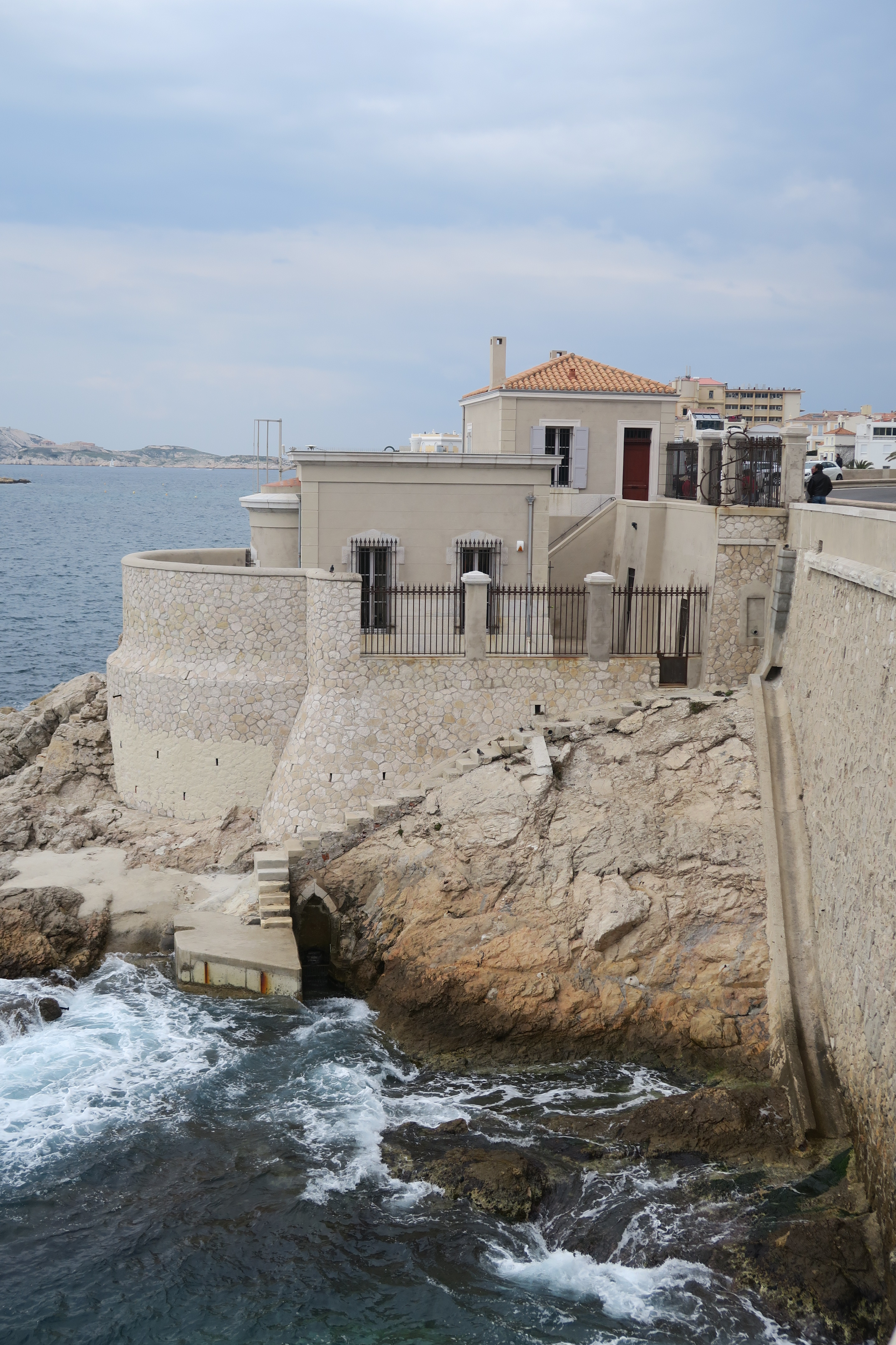 Le marégraphe de Marseille en venant du David - mars 2018